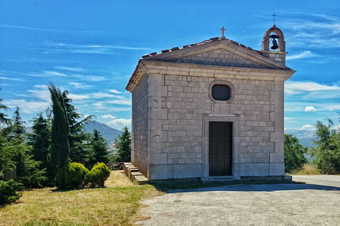 Cappella di San Oto, esterno